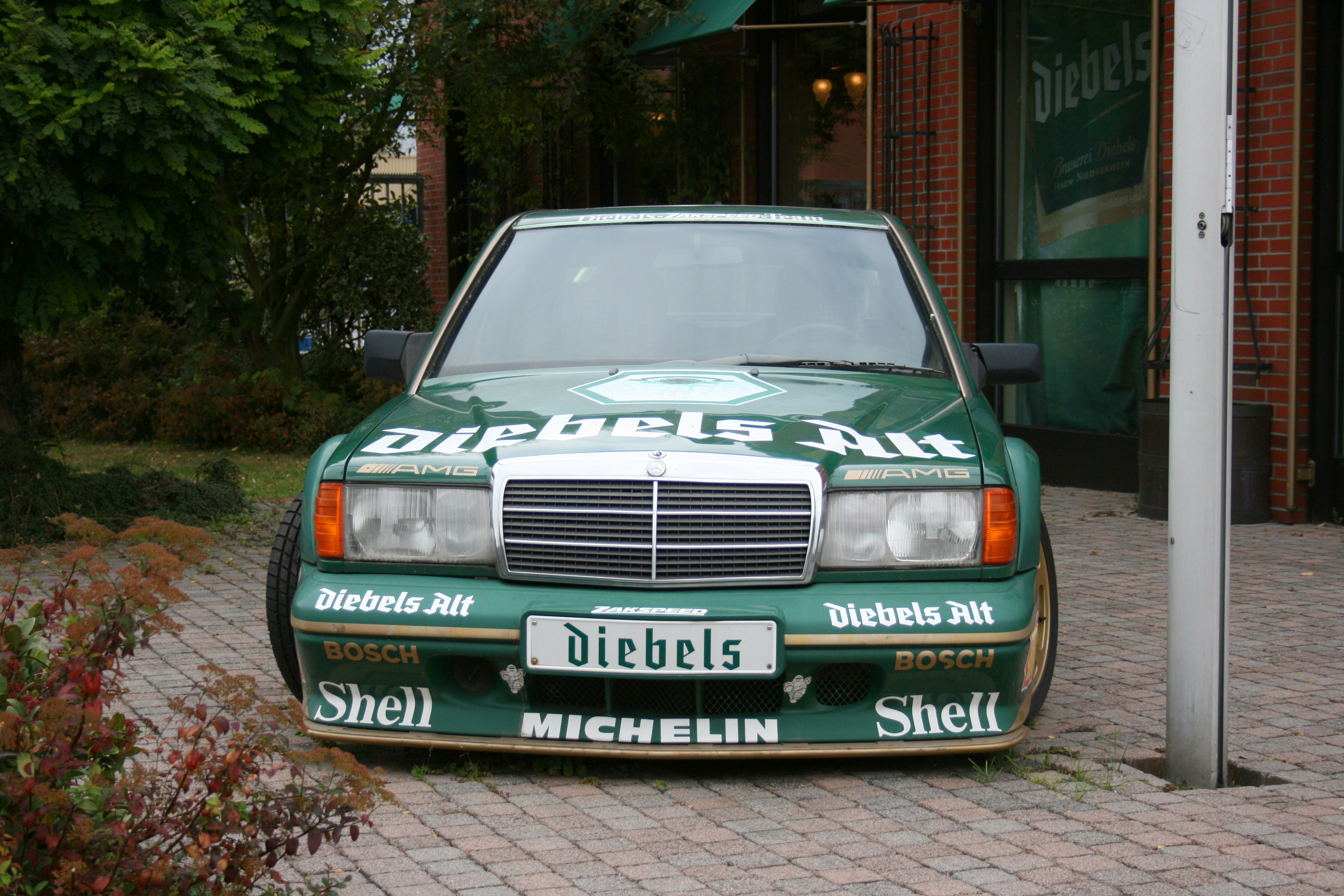 Brauerei Diebels in Issum: Tourenwagen von Jörg van Ommen